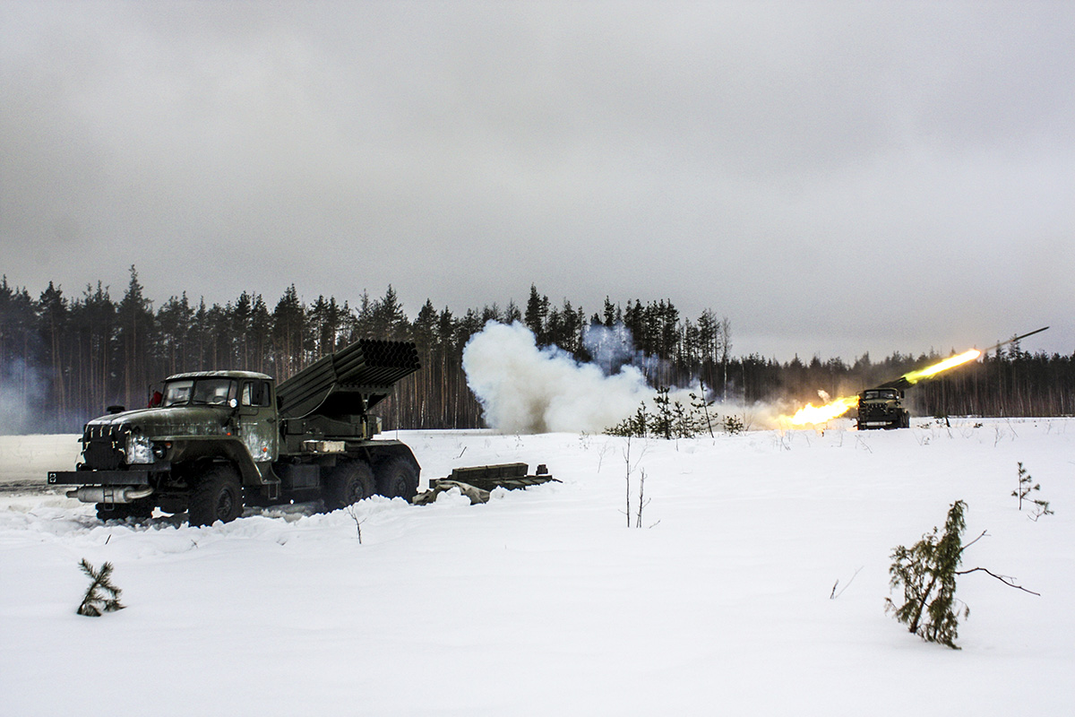 Полковое тактическое учение мотострелковых подразделений Западного военного округа на базе Центра боевой подготовки на полигоне Мулино (Нижегородская область)